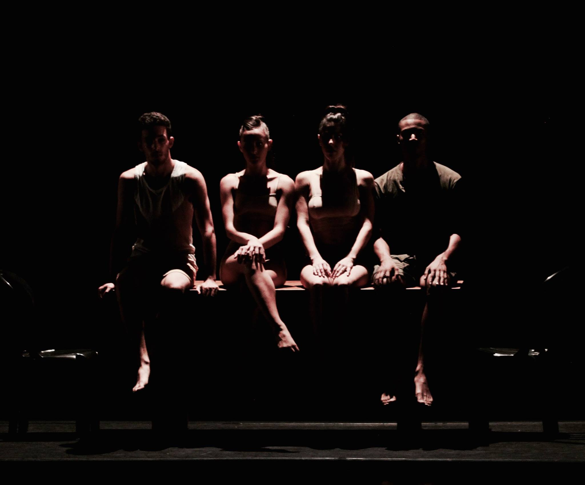 תמונת מחול